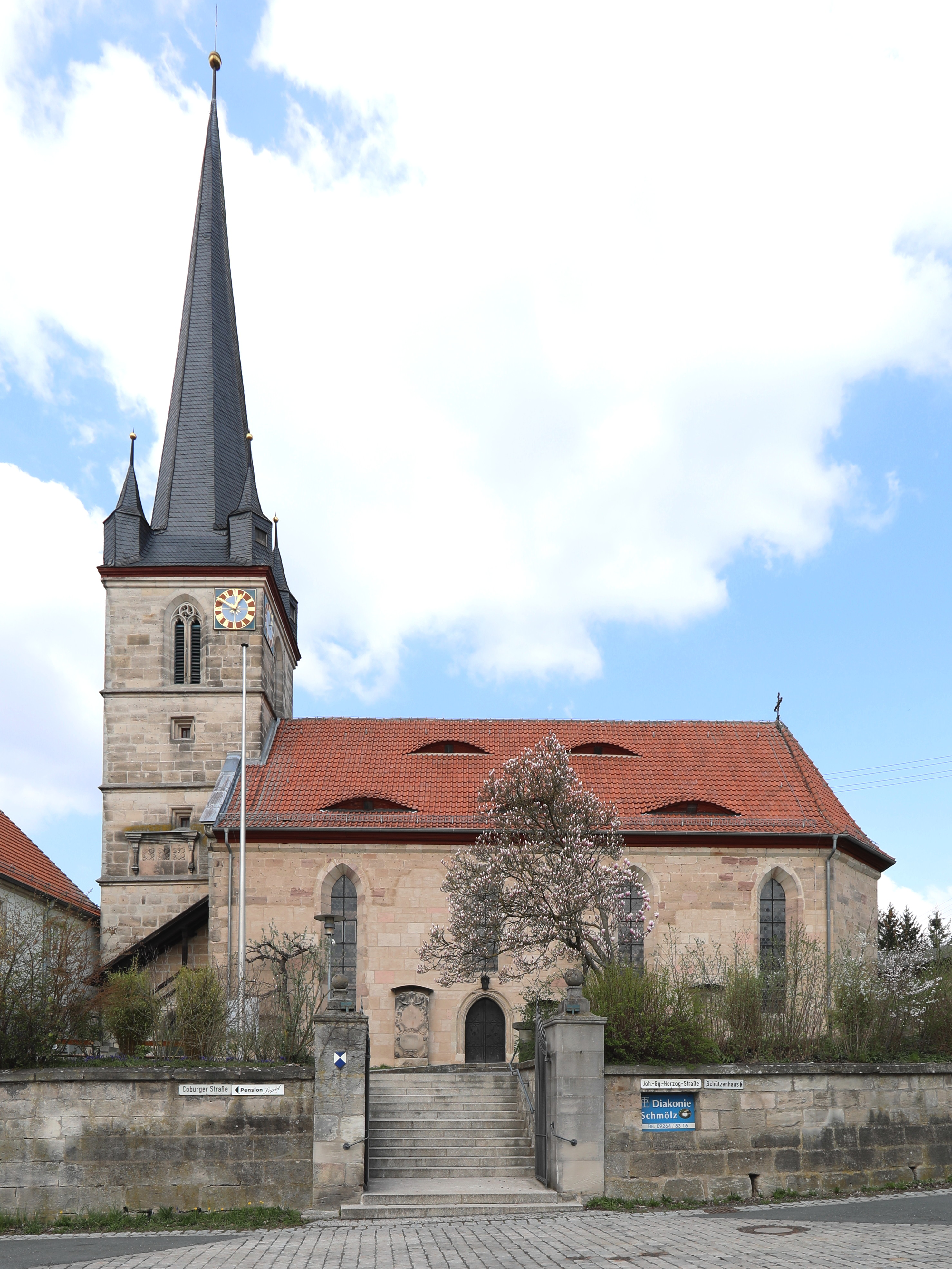 Evangelische Pfarrkirche St. Laurentius in Schmölz